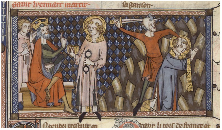 Saint Léonard devant Clovis Ier. Martyre. Cote : Français 185 , Fol. 126. Vies de saints, Légende dorée, France, Paris, XIVe siècle, Richard de Montbaston et collaborateurs.